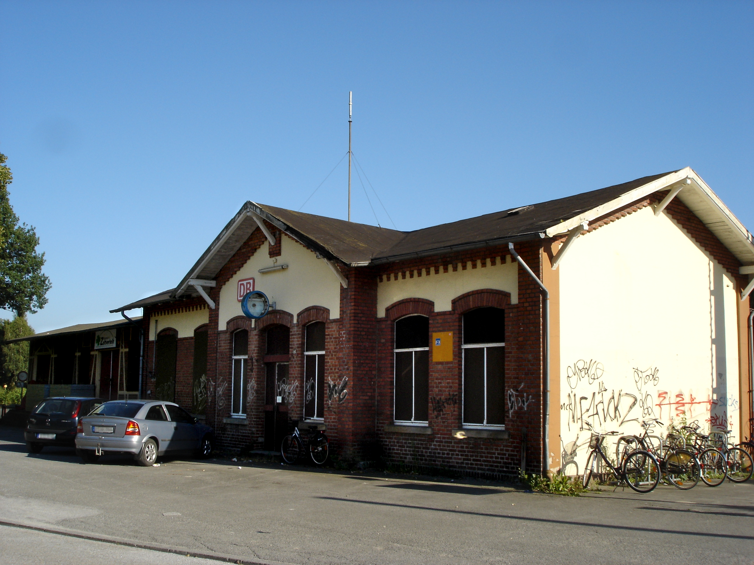 Ehemaliges Empfangsgebäude des Bahnhofs Ibbenbüren Laggenbeck